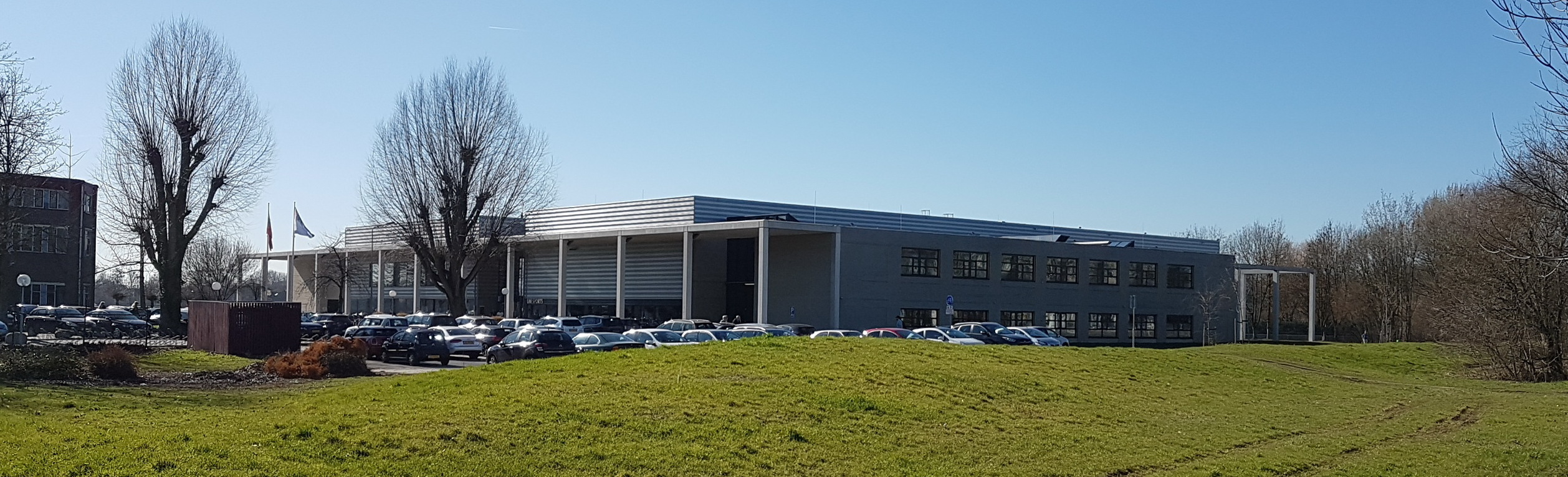 Zicht uit het noordoosten op het Universitair Sportcentrum in Randwyck in Zuidoost-Maastricht.